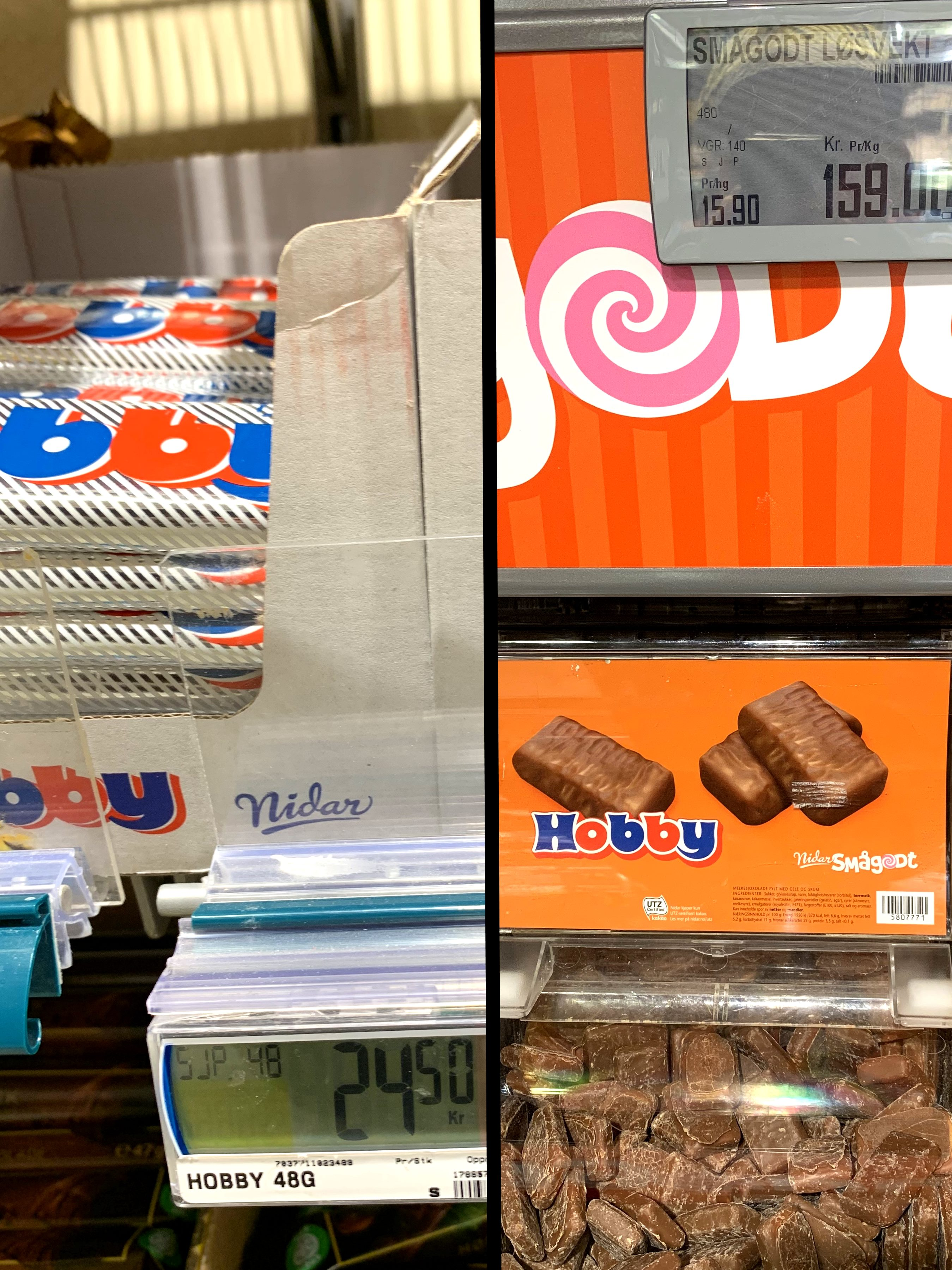 Hobby-sjokolade, innpakket og i løsvekt. Samme sjokolade koster ca. 500 kr/kg i innpakket form, men bare 159 kr/kg i løsvekt.